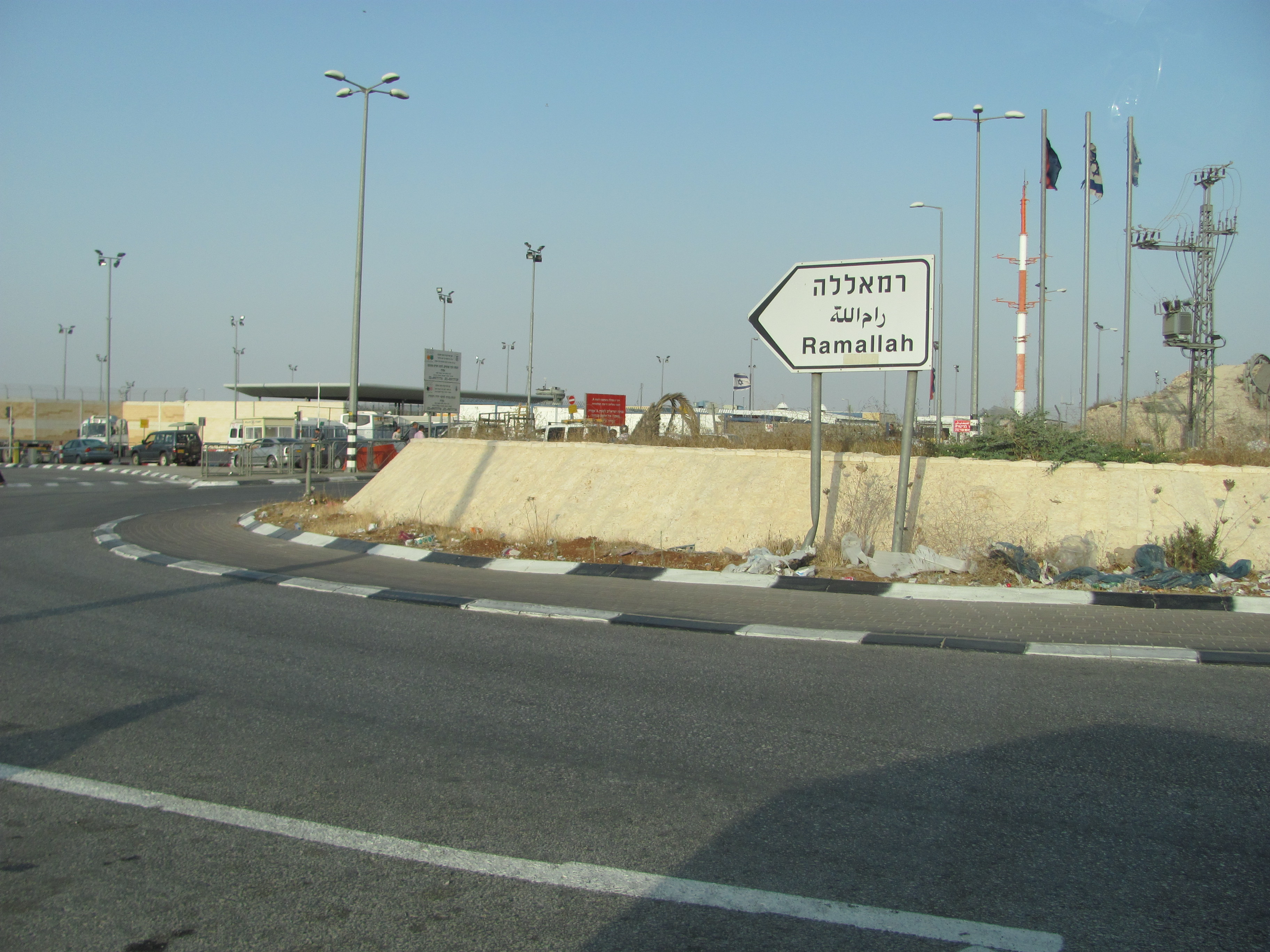 Control fronterizo montado por Israel en el límite con Ramallah, Palestina.